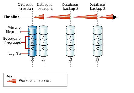 Монгол: Энгийн сэргээх загварын дагуу мэдээллийн санг нөөцлөх